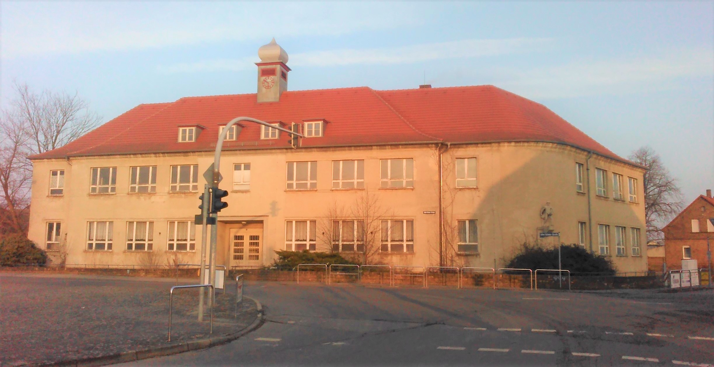 Ehemalige Volksschule in Lauchhammer-Süd, besucht von Ulrich Hofmann